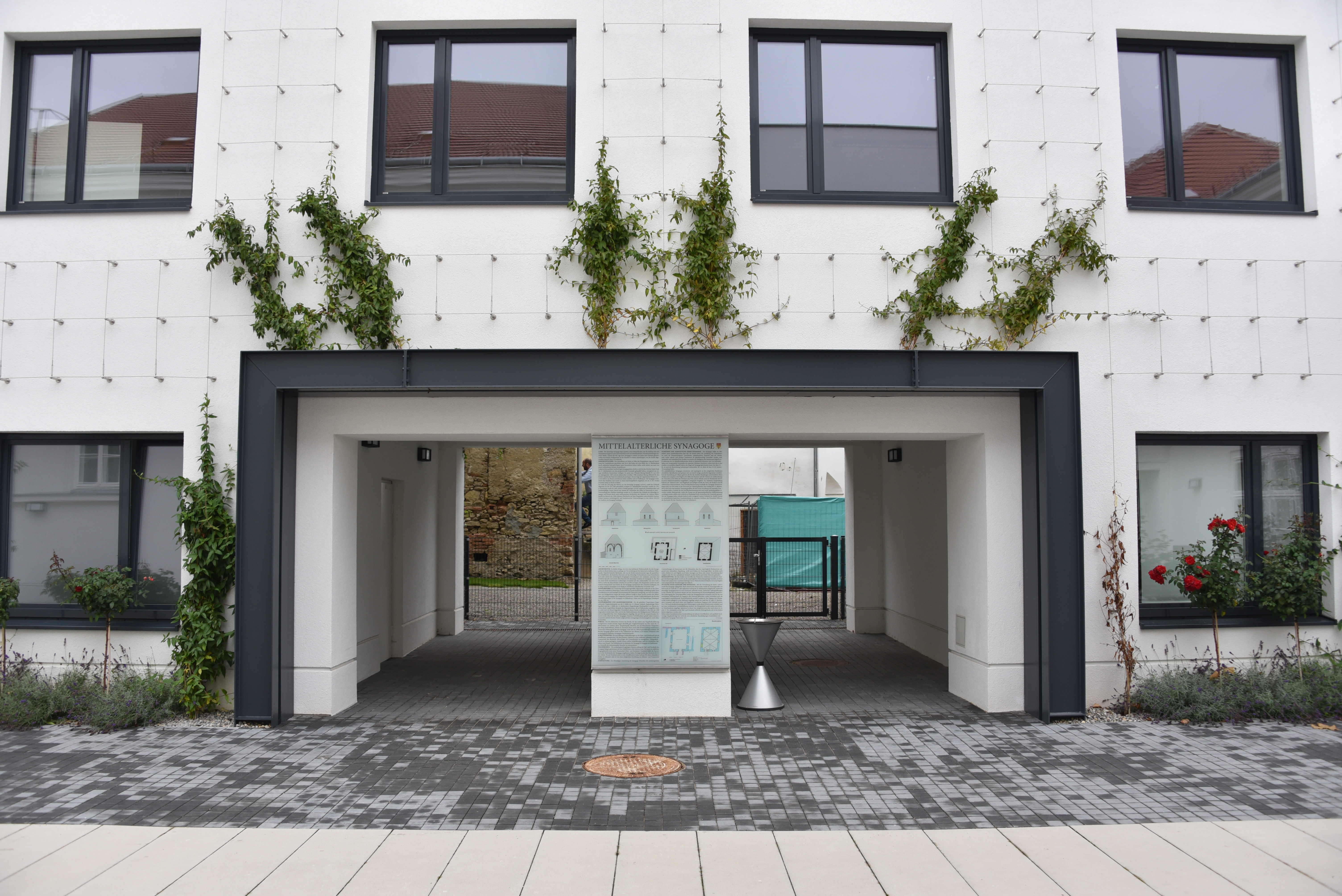 Rathaus Bruck an der Leitha mit Tafel für die Synagoge